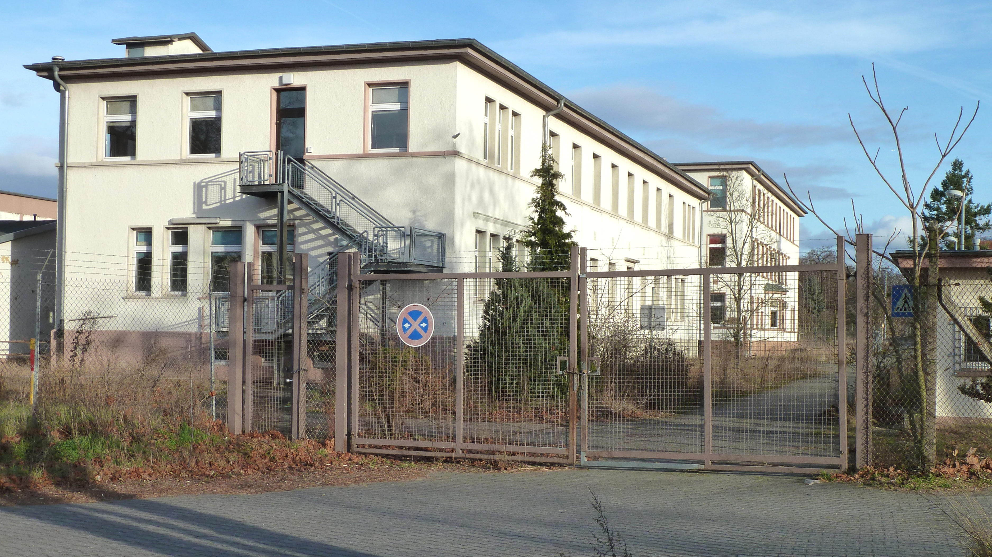 Darmstadt, ehem. Stars and Stripes-Kaserne am Eulerflugplatz